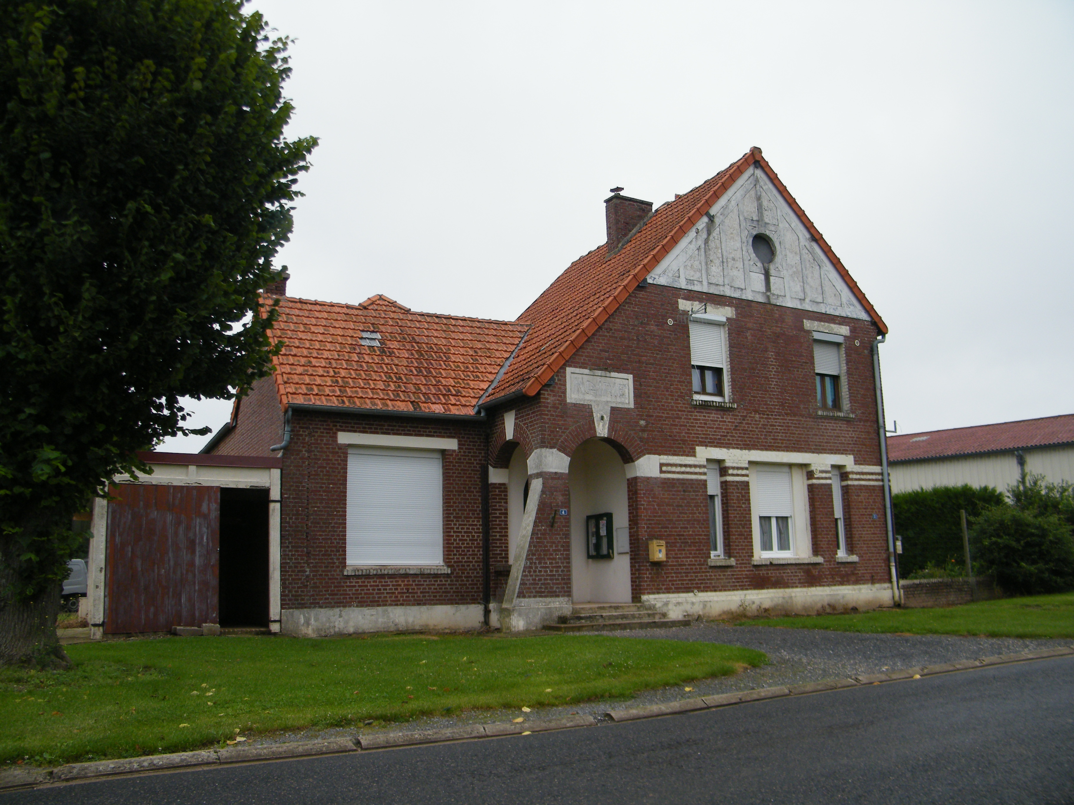 Mairie.